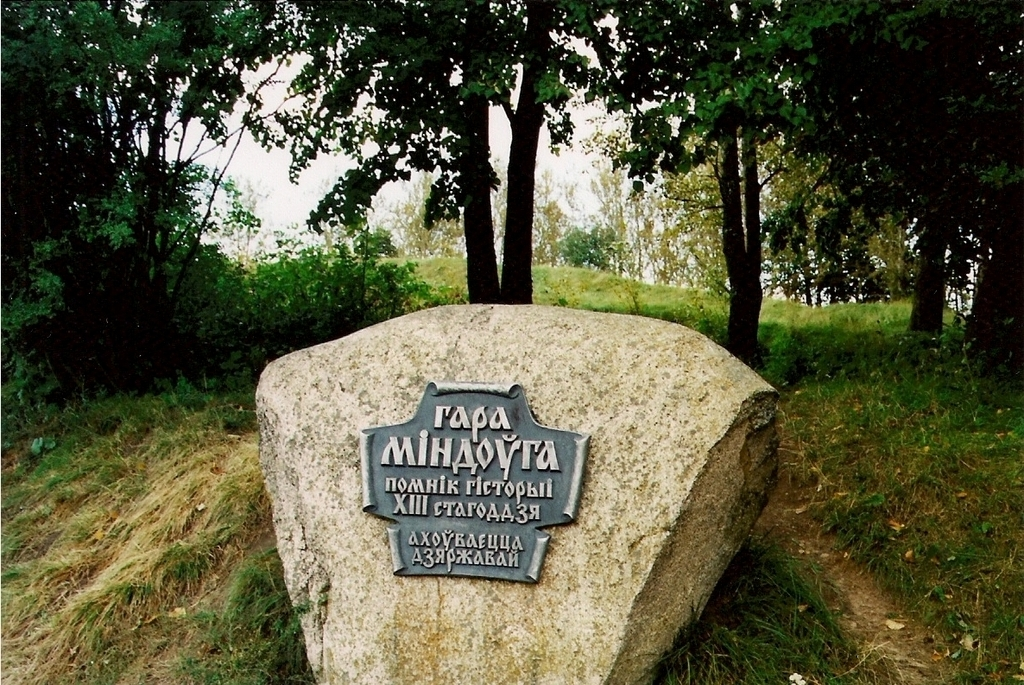 Беларуская (тарашкевіца): Гара Міндоўга з тэрыторыяй у Наваградку. This is a photo of Belarusian heritage monument. Reference number: 412В000387 ( WLM)